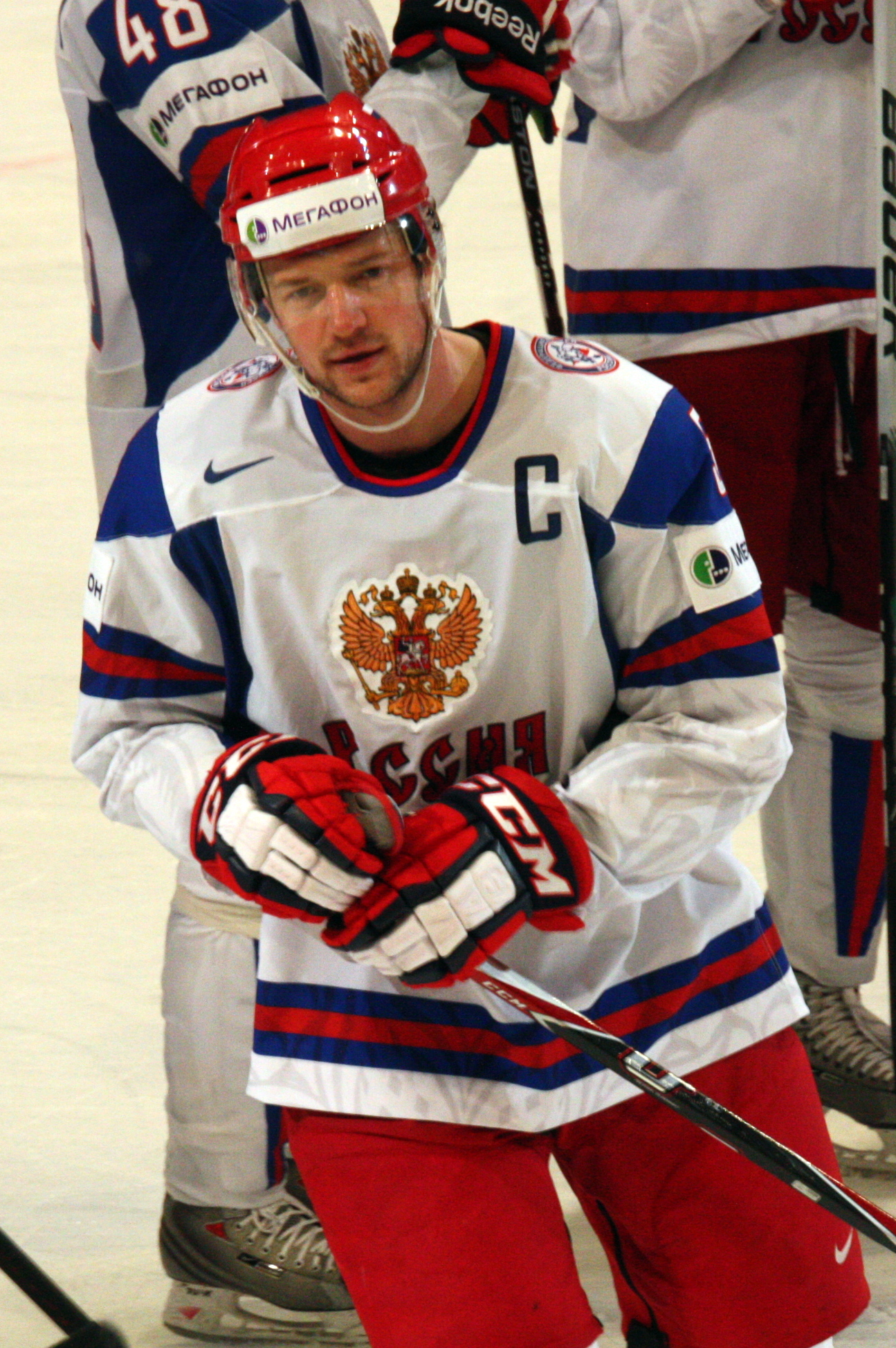 Илья Никулин, ЧМ 2012, 15.05.2012, Россия-Италия, Стокгольм, Швеция